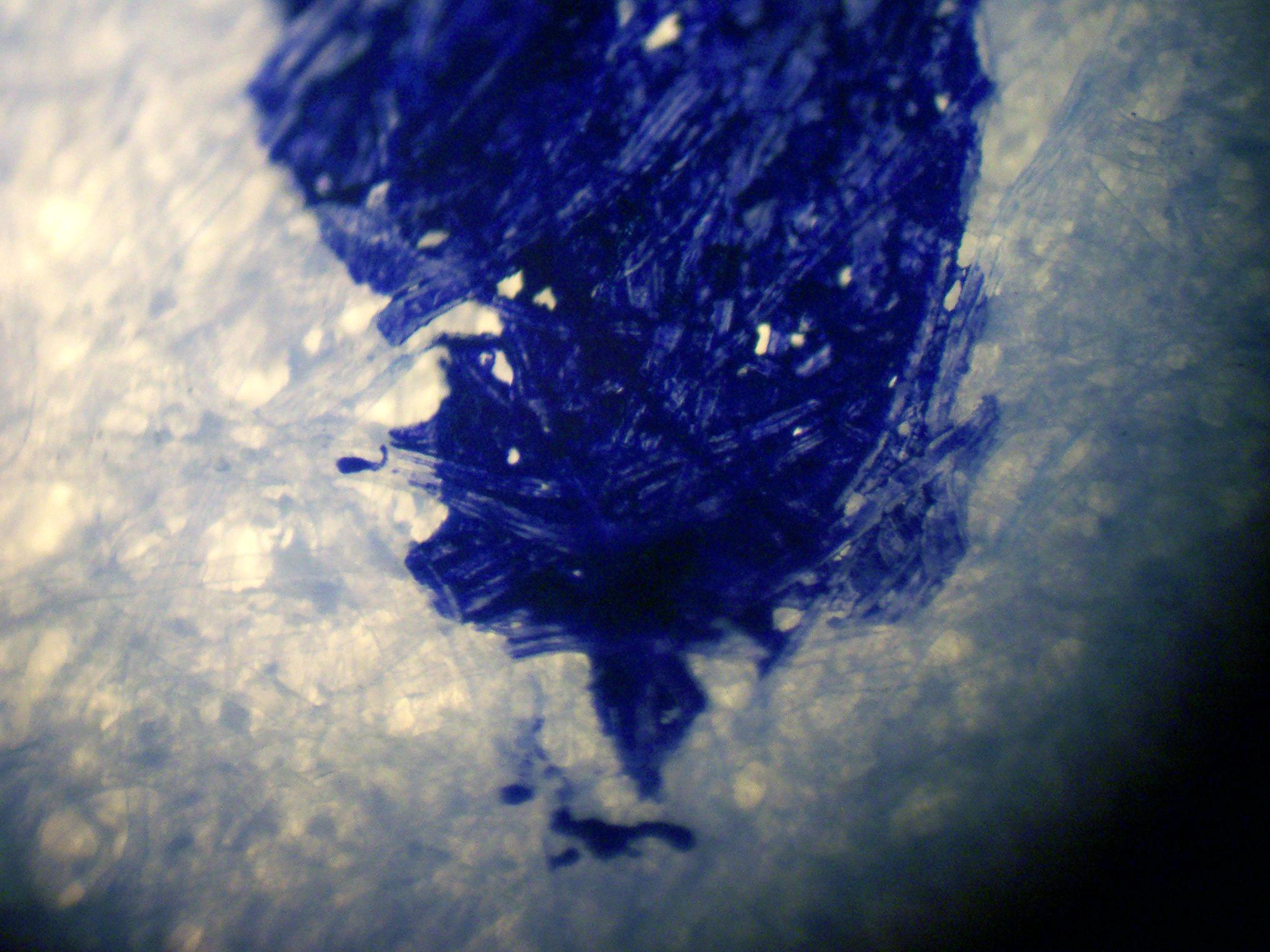 Tintenstrich eines Füllers bei ca. 50-facher Vergrößerung.